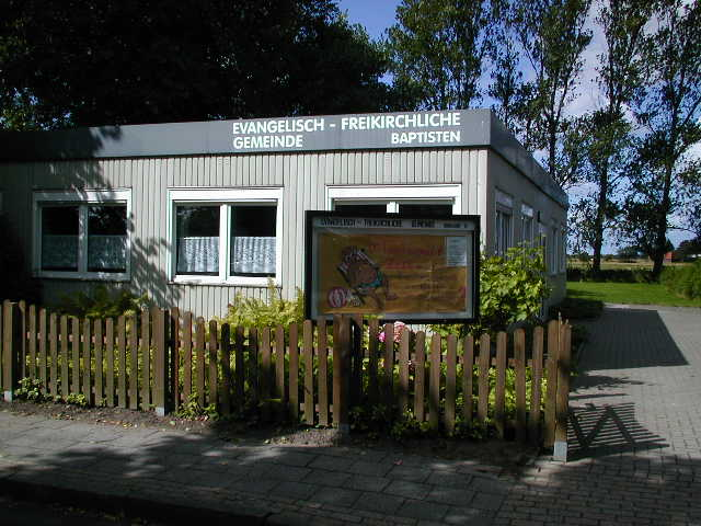 Container der neu gegründeten Evangelisch-Freikirchlichen Gemeinde Esens Foto:privat (Helms) public domain